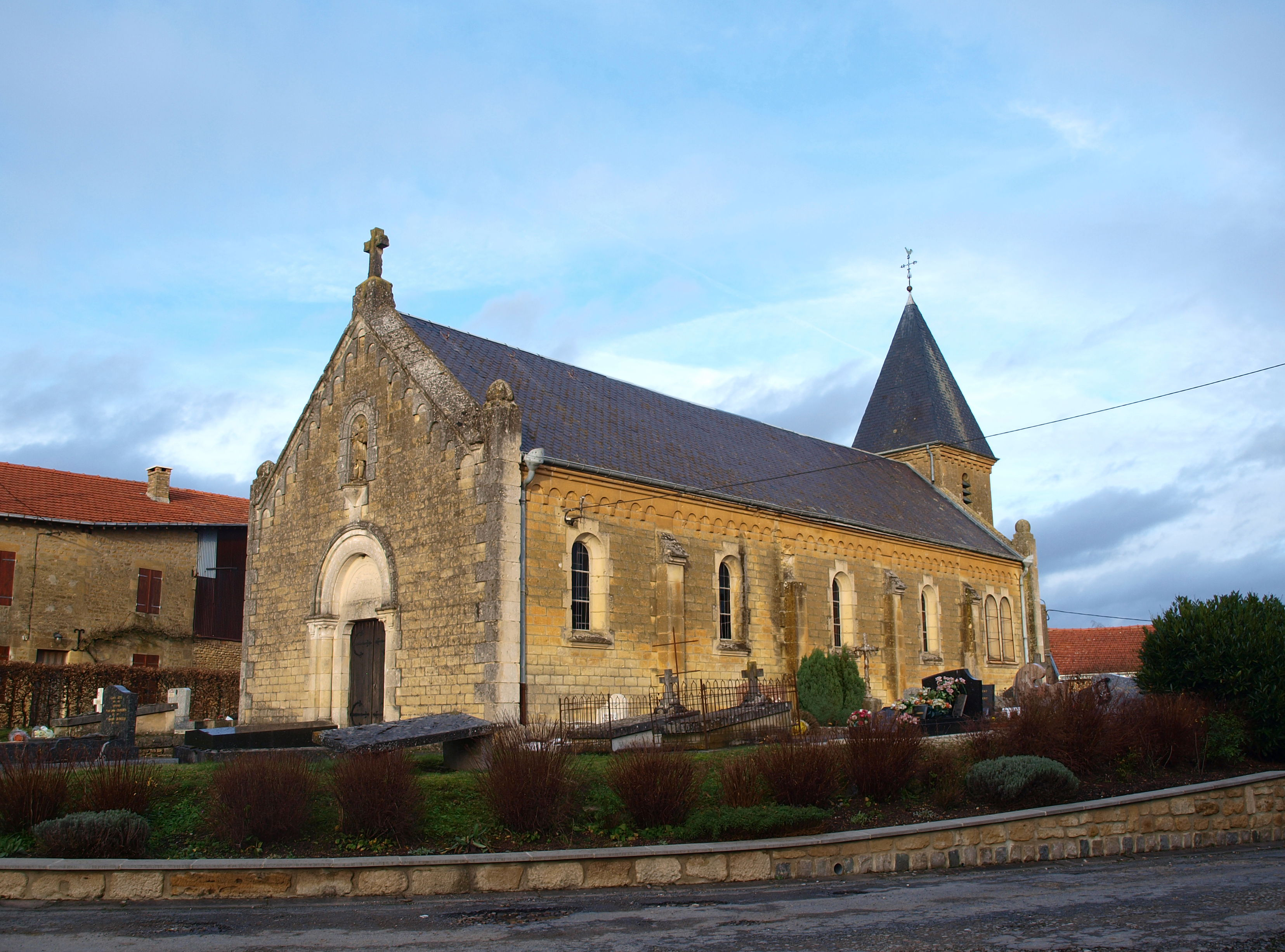 Neuville-Day (Ardennes, France) ; hameau de Day ; l'église.